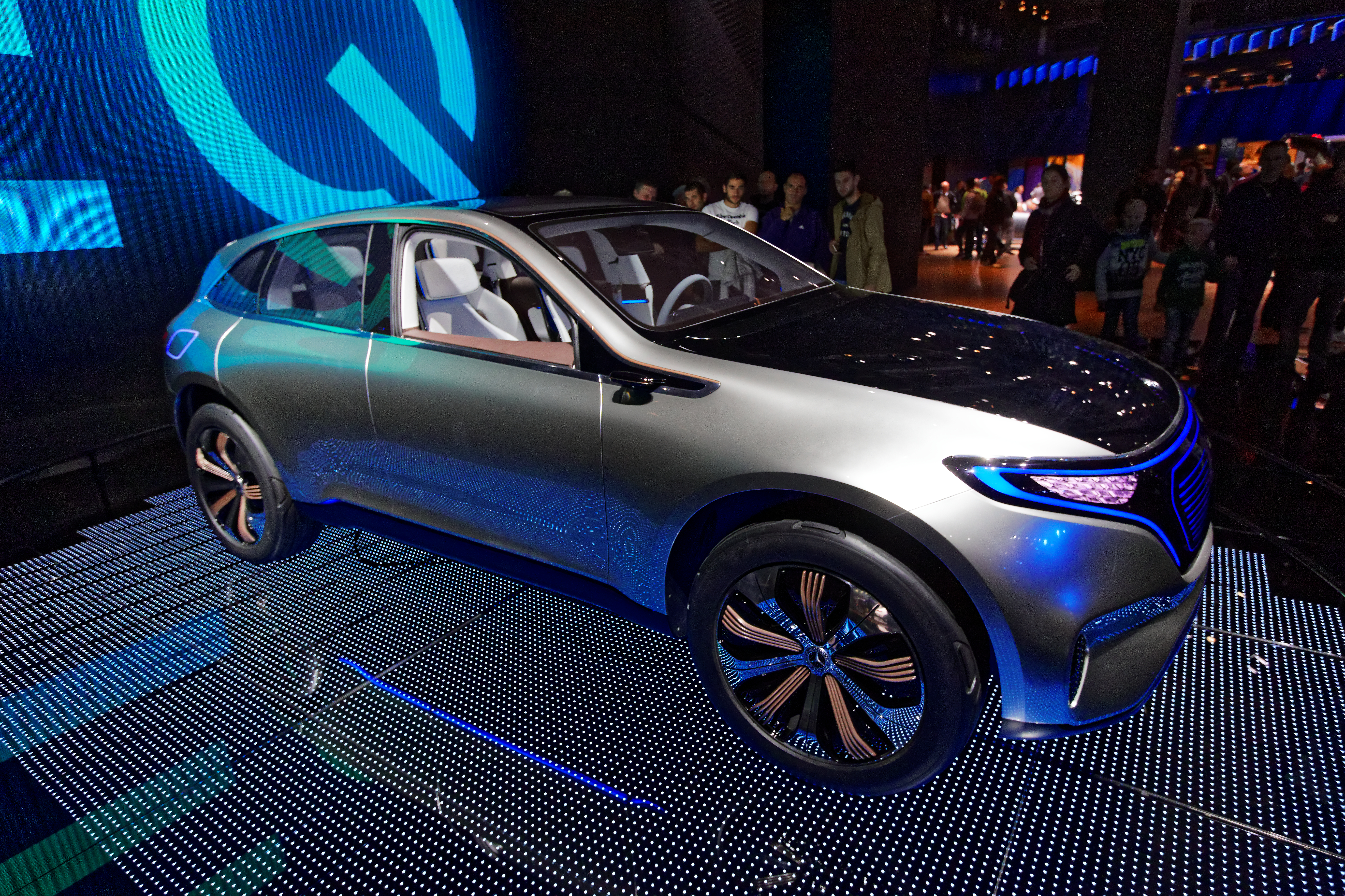 Une Mercedes Generation EQ présentée lors du mondial de l'automobile de Paris 2016.